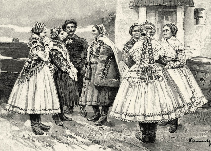 Szécsény környéki palóc népviselet.